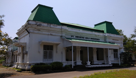 Hingga saat ini bangunan tersebut masih tetap berdiri di Kawasan Pabrik Gula Cepiring